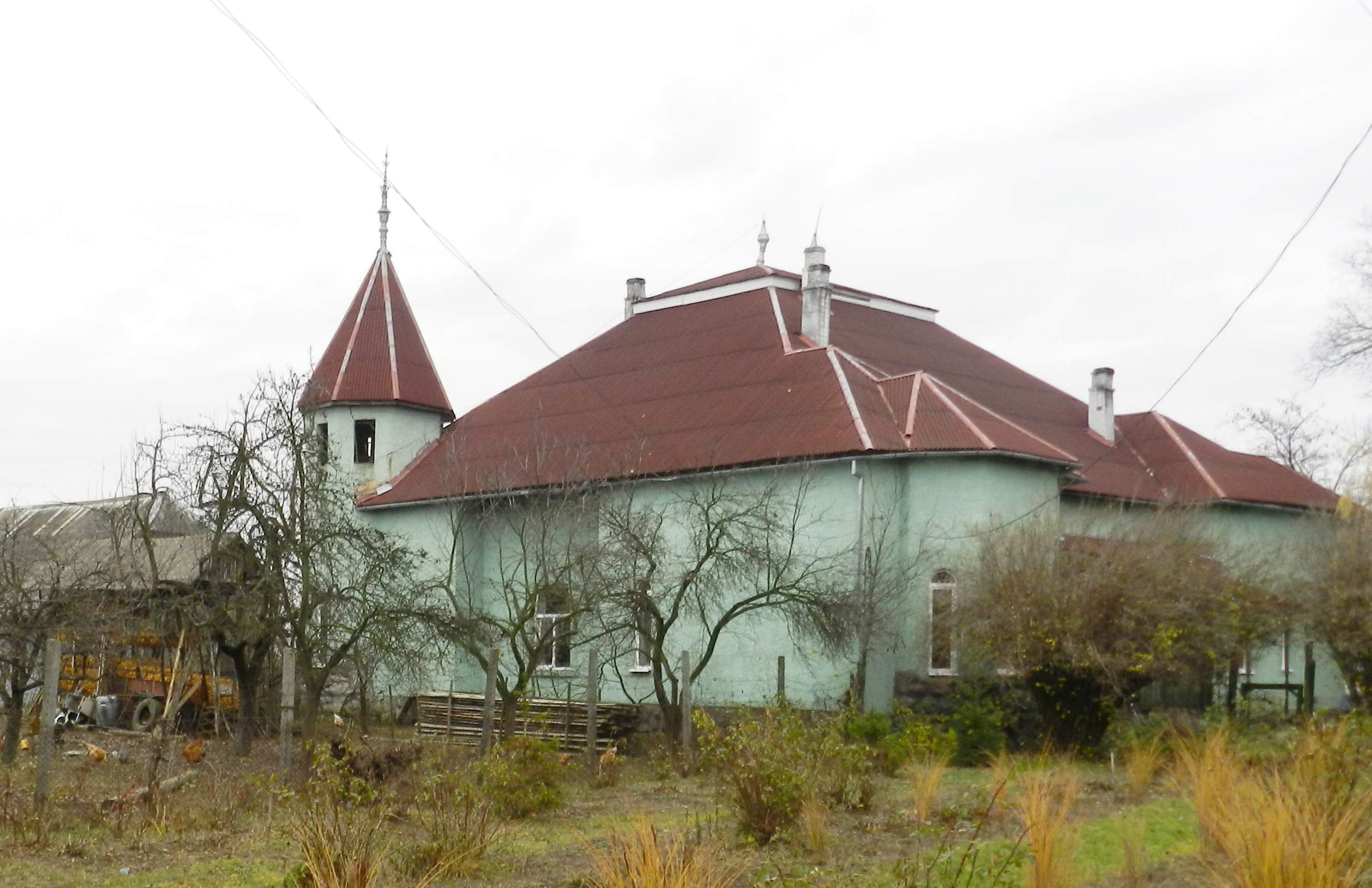 Колишня садиба Лоняї, нині - корпус школи